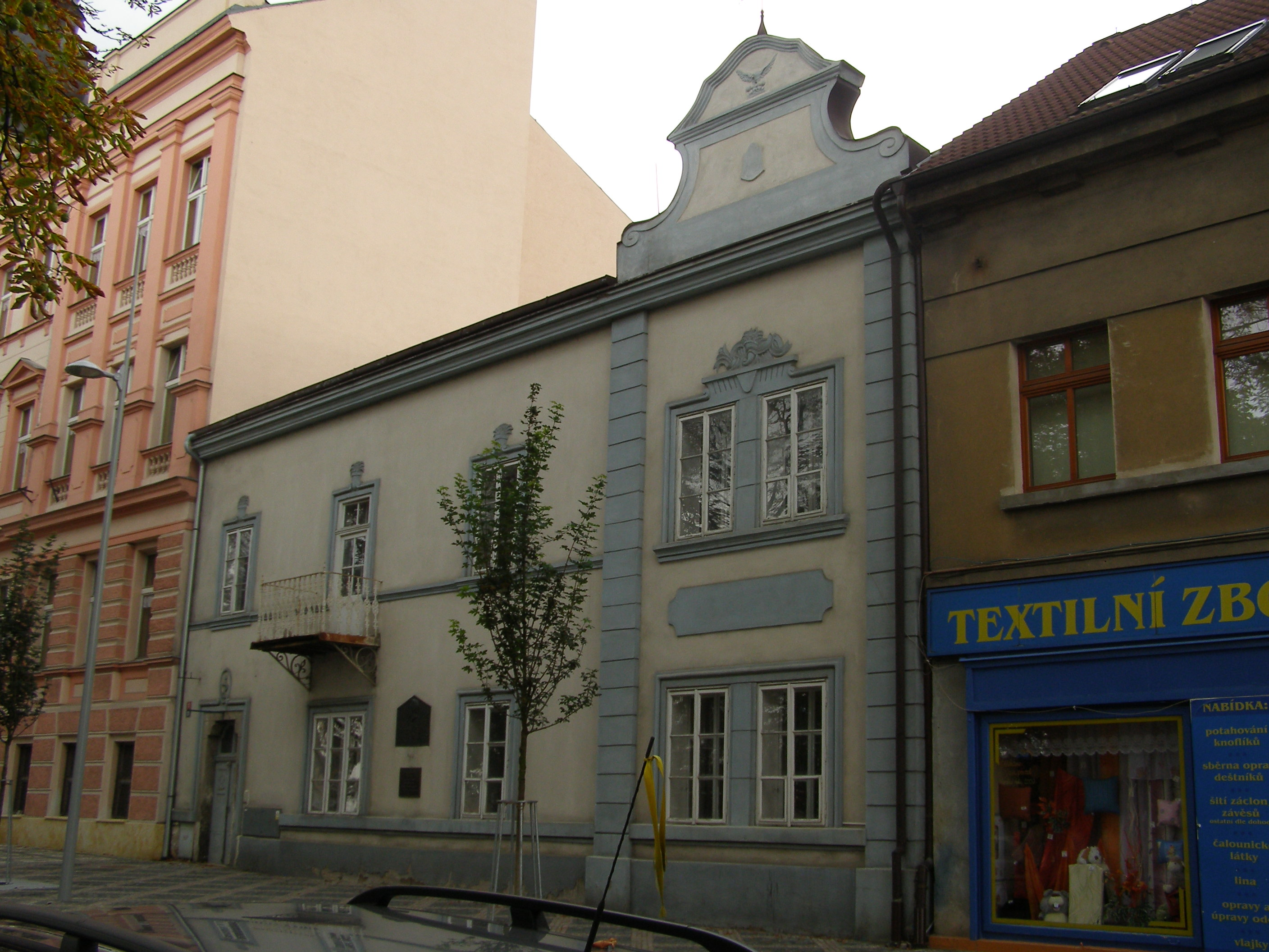 Měšťanský dům - rodný dům prof. MUDr. Jedličky (Lysá nad Labem), nám. B. Brozného 13/20, Lysá nad Labem